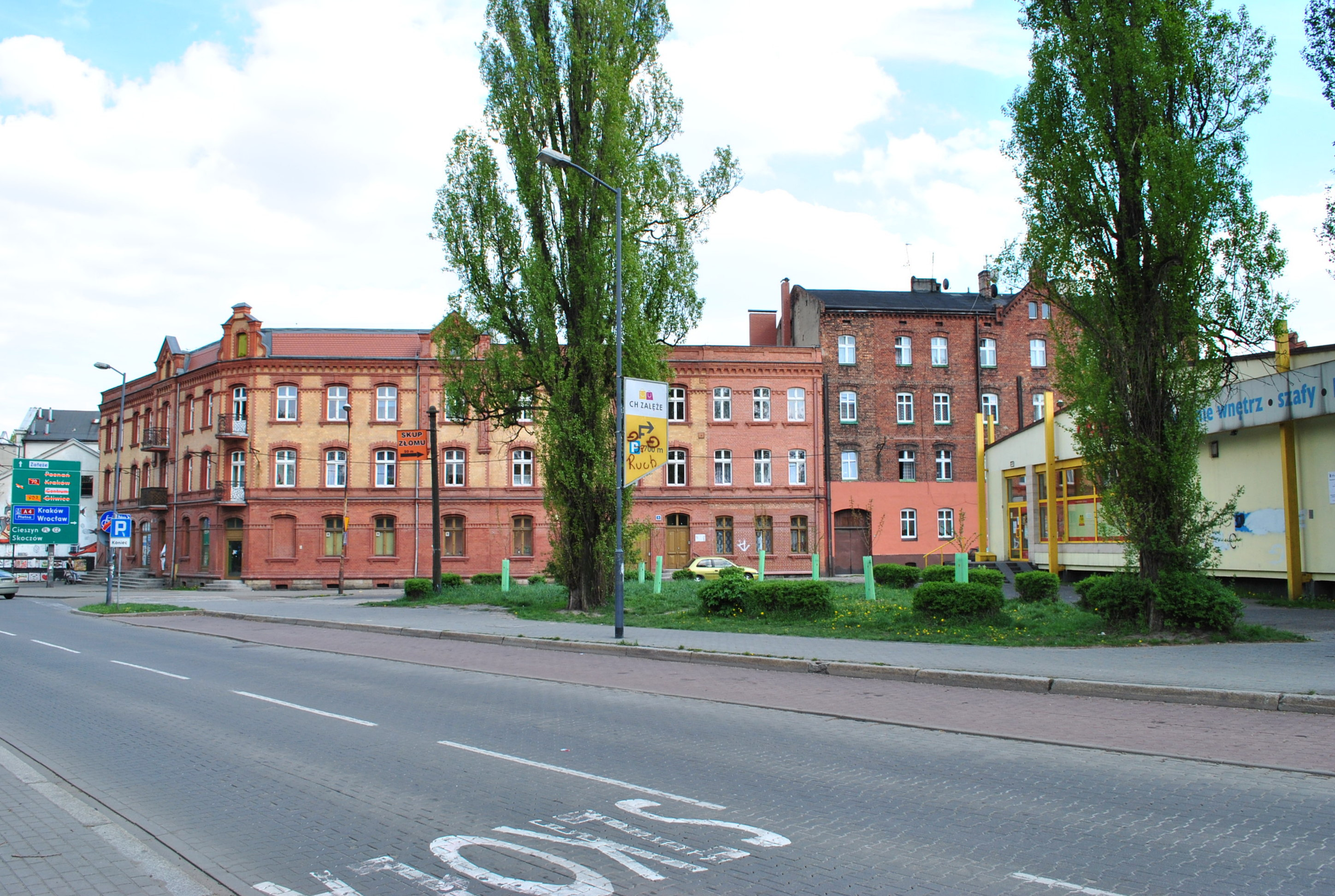 Katowice, Załęże. Ulica Pokoju